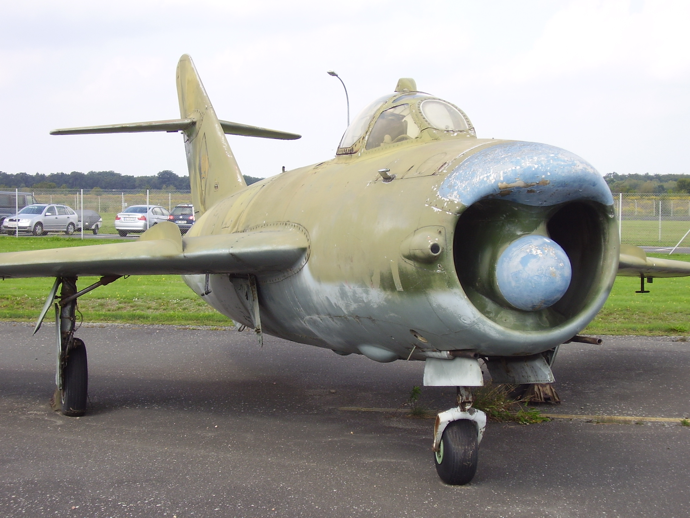 Luftwaffenmuseum der Bundeswehr; Airforce Museum of the Bundeswehr; Berlin-Gatow